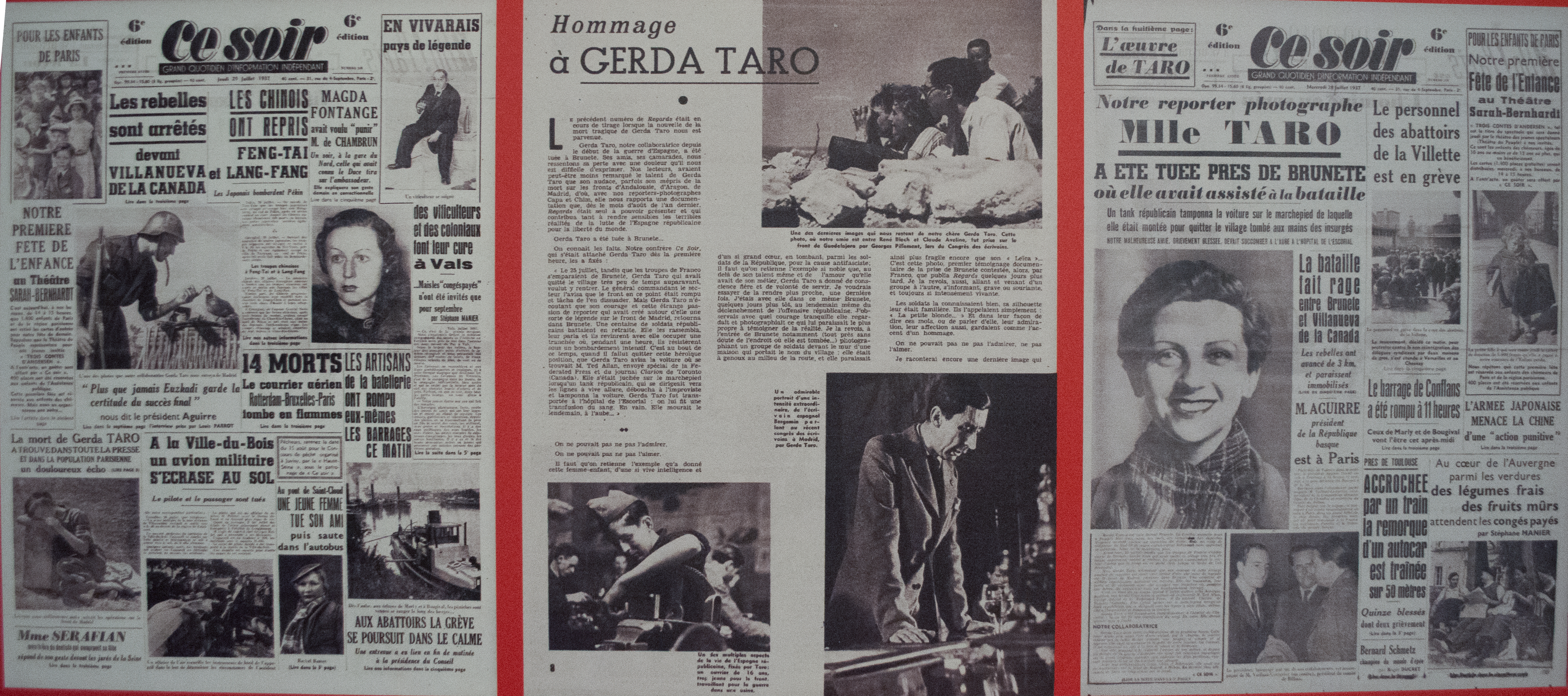 Noticias sobre la muerte de Gerda Taro, que asistió como reprotera de guerra en la batalla de Brunete. Exposición Por la defensa de la Cultura en el Centro del Carmen de Valencia.